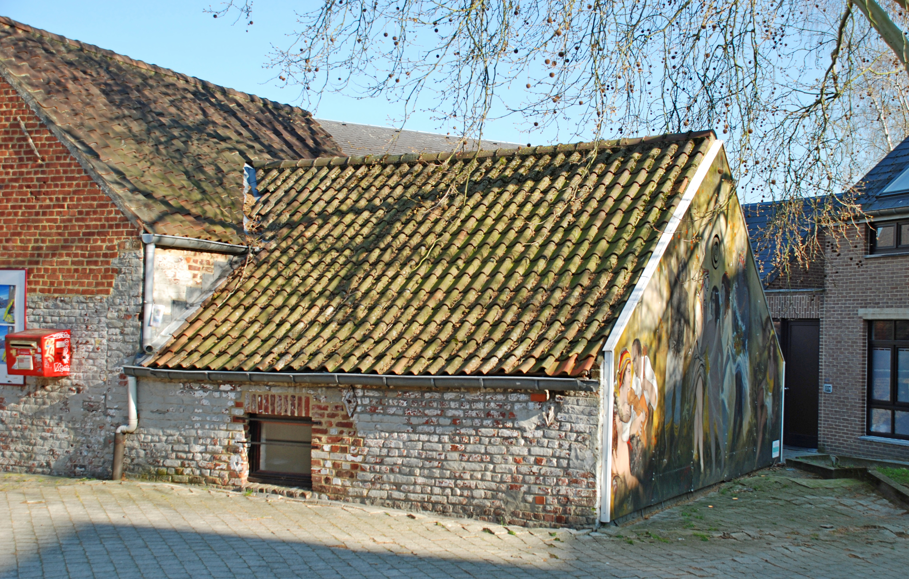 Belgique - Brabant wallon - Ottignies-Louvain-la-Neuve - Ferme de Blocry (Place de l'Hocaille)